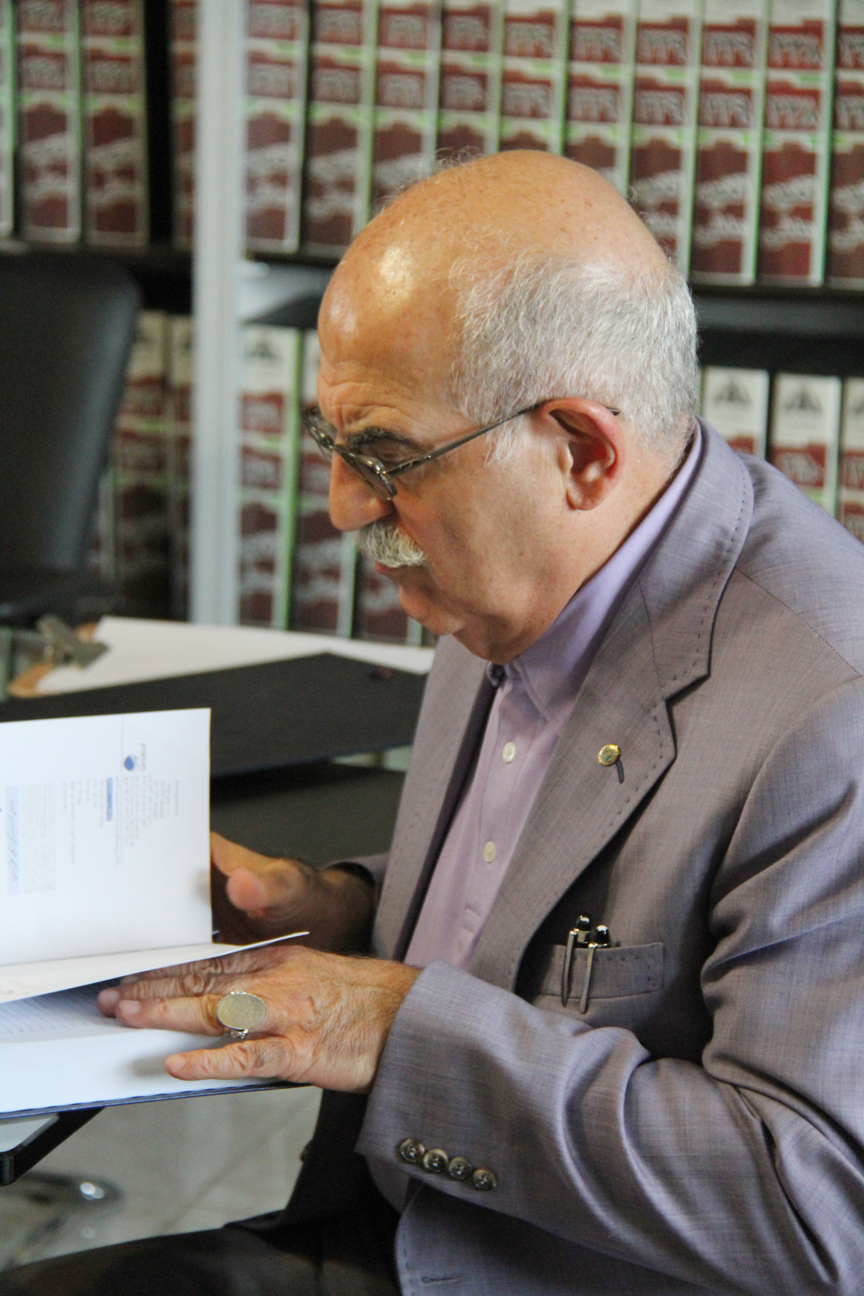 بهمن کشاورز در مرکز پژوهشی دانشنامه های حقوقی علامه